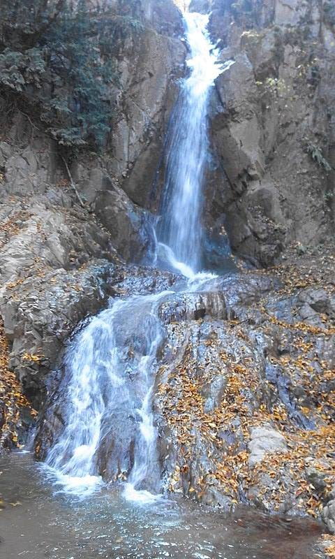 Cəlaləddin şəlalələsi Tovuz rayonu